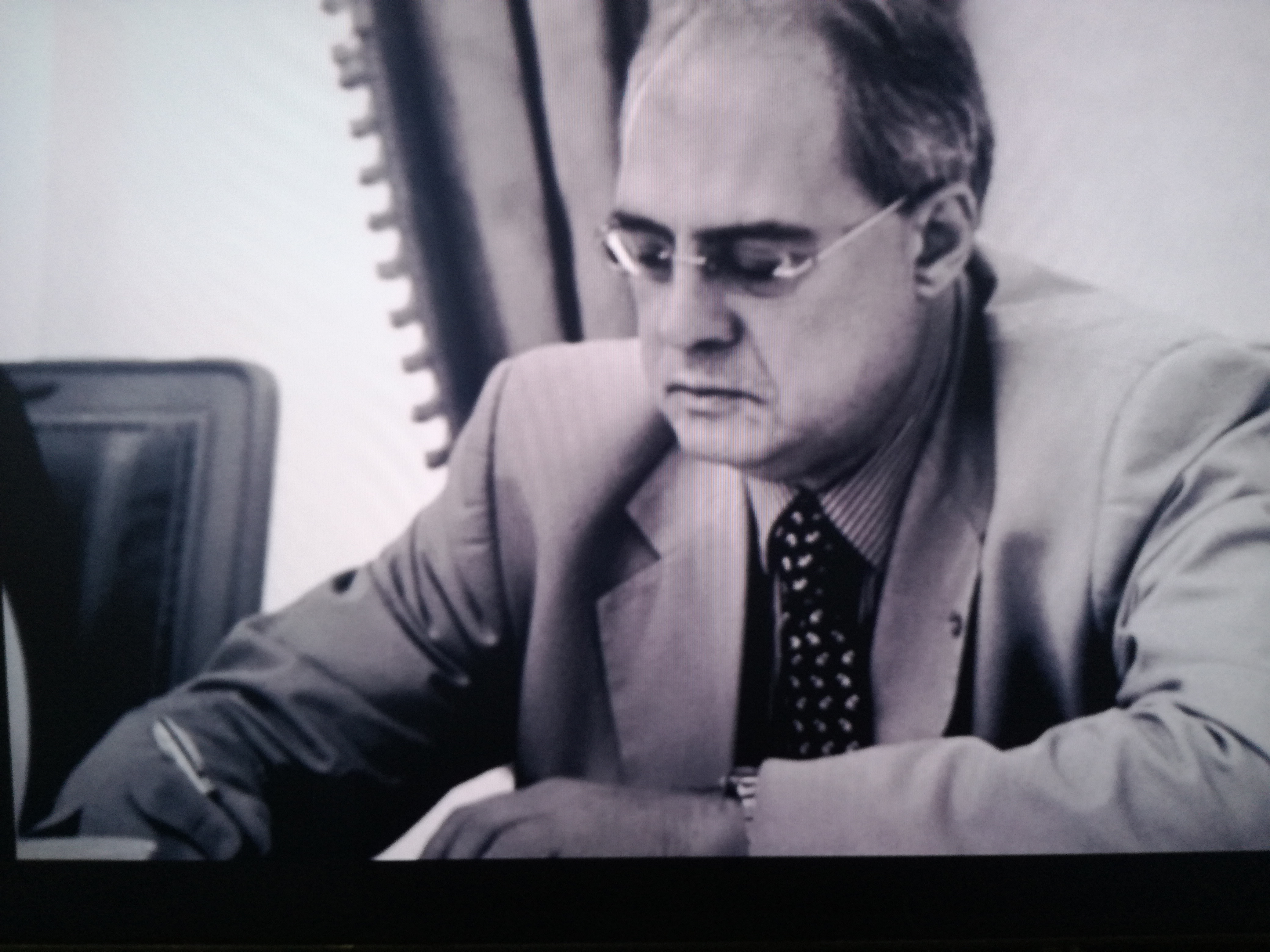 Morris Lorenzo Ghezzi